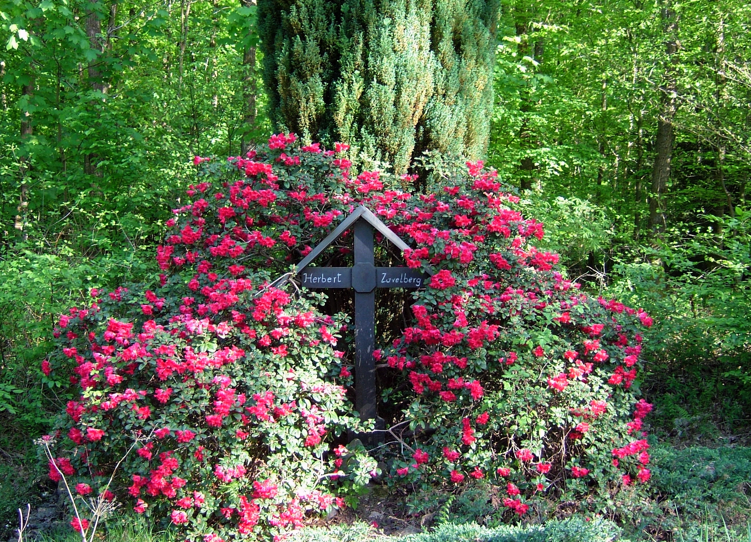 Zavelbergkreuz am Professorenweg im Kottenforst. Herbert Zavelberg gebürtig aus Kirchsahr. Er kam hier beim Fällen eines Baumes ums Leben.